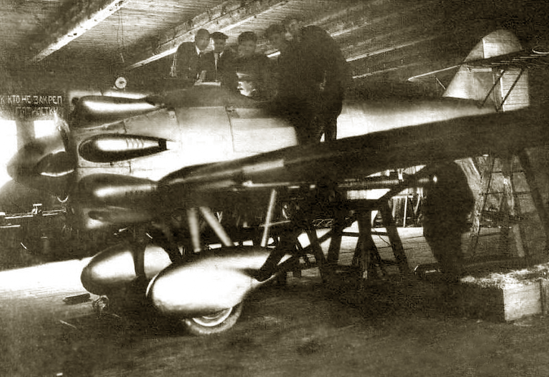 И.В. Сталин в кабине опытного пушечного истребителя И-Z в сборочном цехе ЦКБ-39 ОГПУ. Стоят слева направо Г.Е. Чупилко, В.М. Молотов, К.Е. Ворошилов А.Н. Рафаэлянц Е.С. Пауфлер. 6 июля 1931 г. Prototype, with helmeted cowling, being inspected by Stalin.